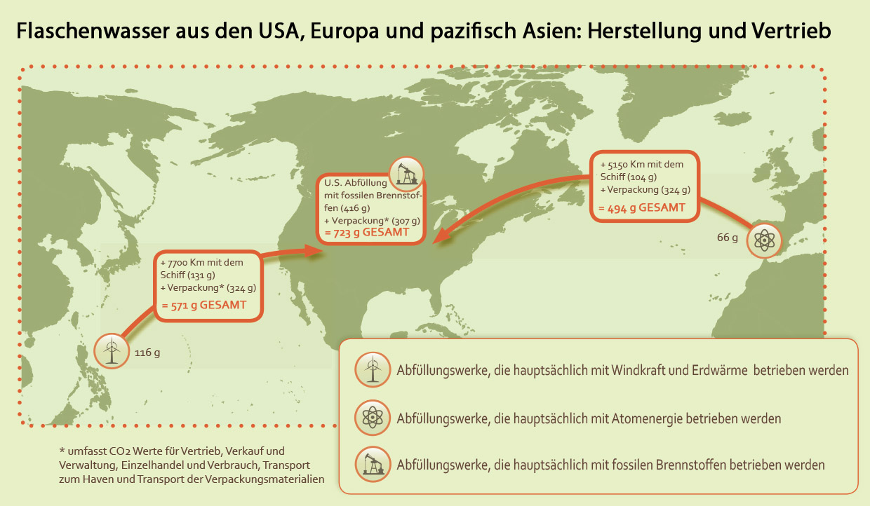 Grafik über den CO2-Fußabdruck von Flaschenwasser. Es werden drei verschiedene Varianten gegeben